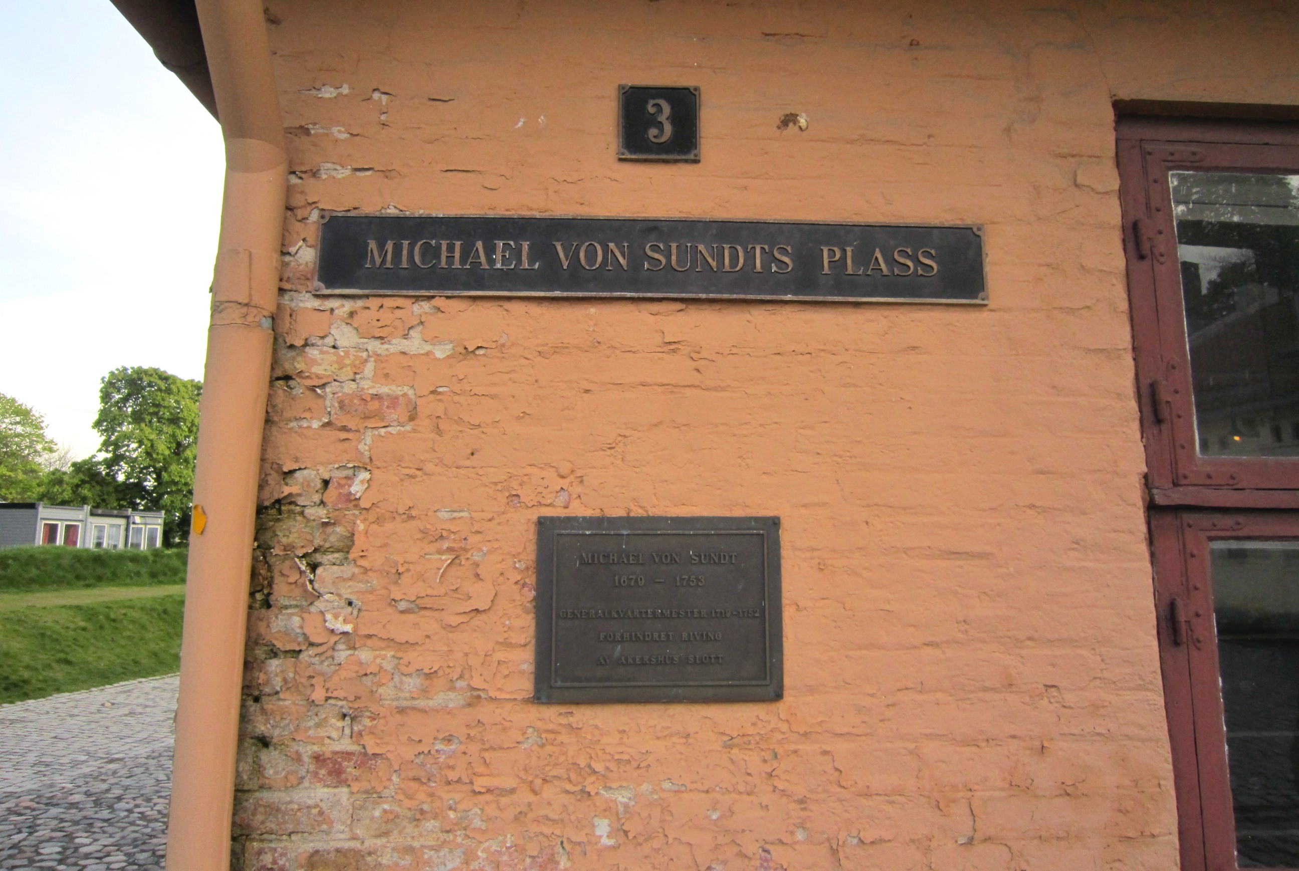 Barakk med minneplakett over Michael von Sundt på plassen som bærer hans navn